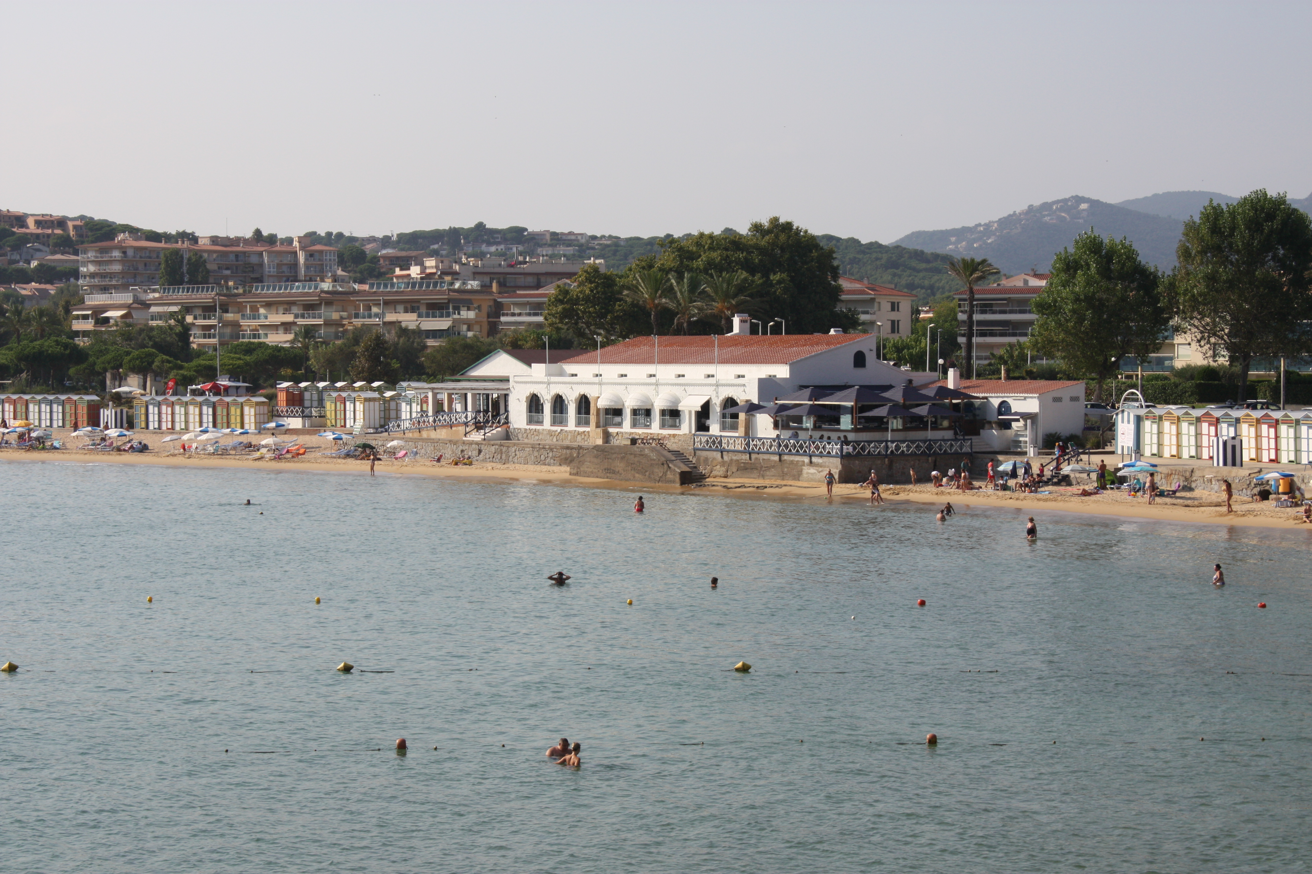 Vista dels Banys de S'Agaró (acutal Taverna del Mar) a la Platja de Sant Pol